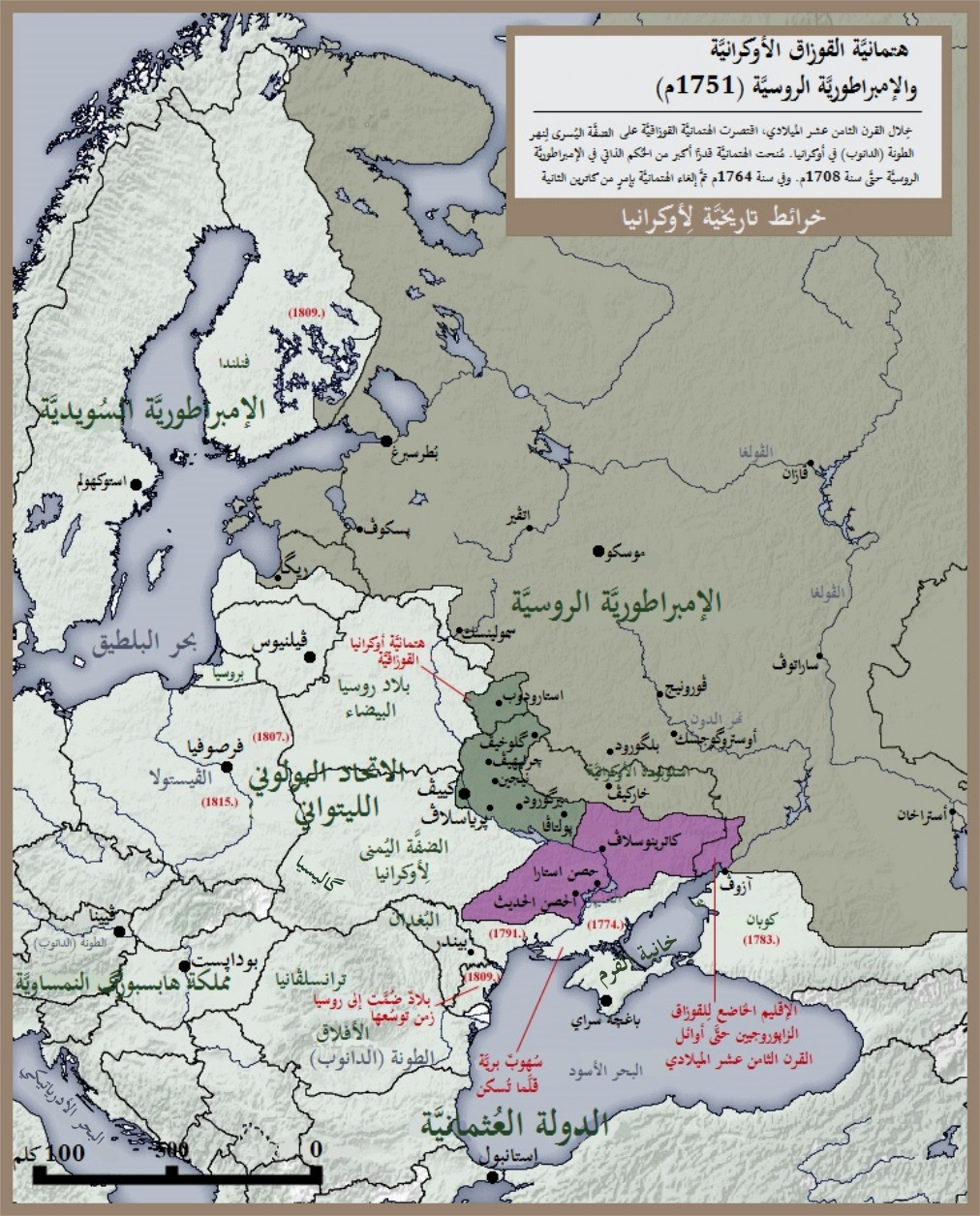 خريطة تاريخيَّة لِلهتمانيَّة القوزاقيَّة الأوكرانيَّة وإقليم زاپوروجيا الذي اتخذه القوزاق موطنًا لهم داخل الإمبراطوريَّة الروسيَّة.